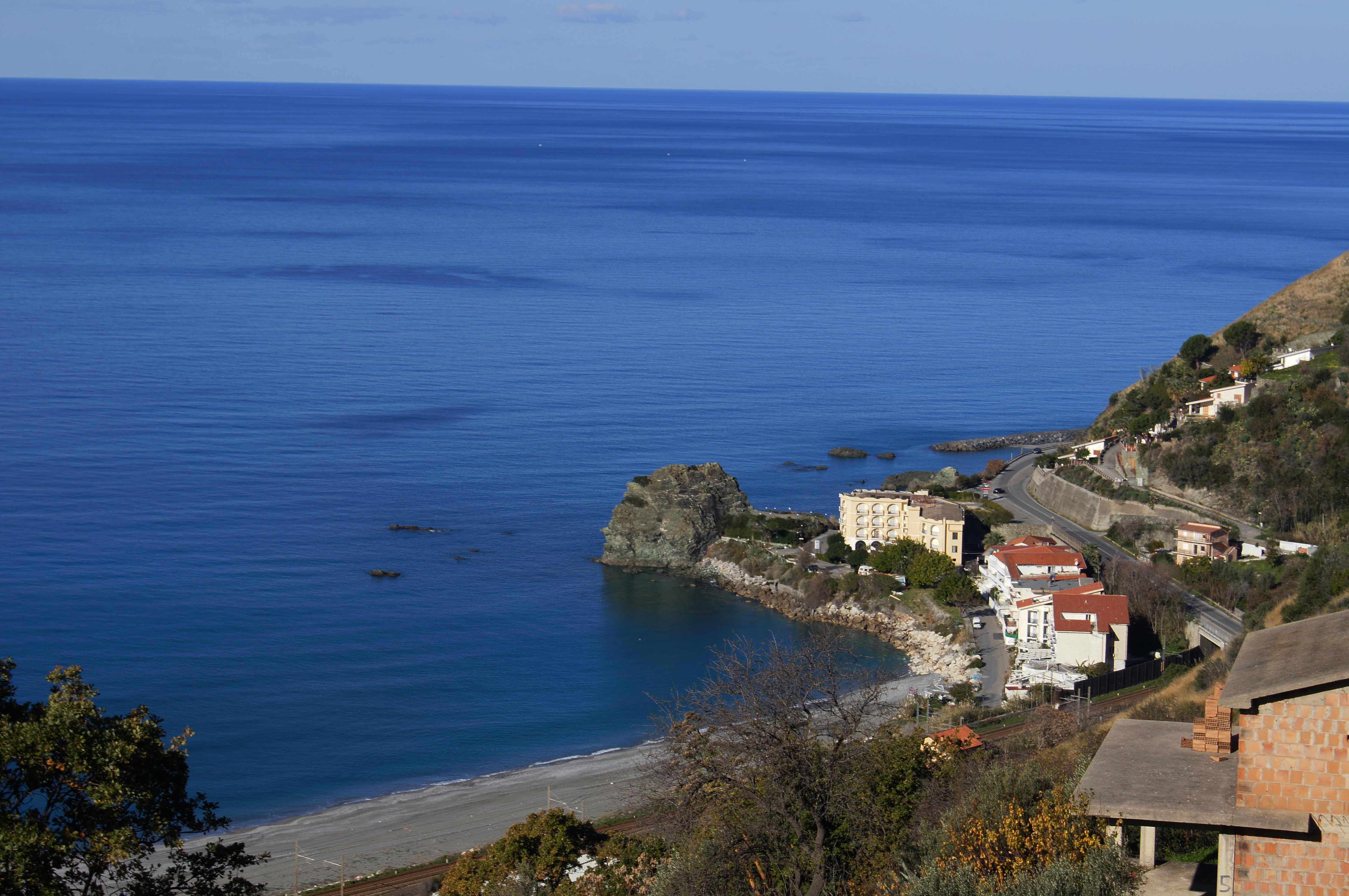 Panorama di Coreca, Calabria visto dal Colle degli Ulivi